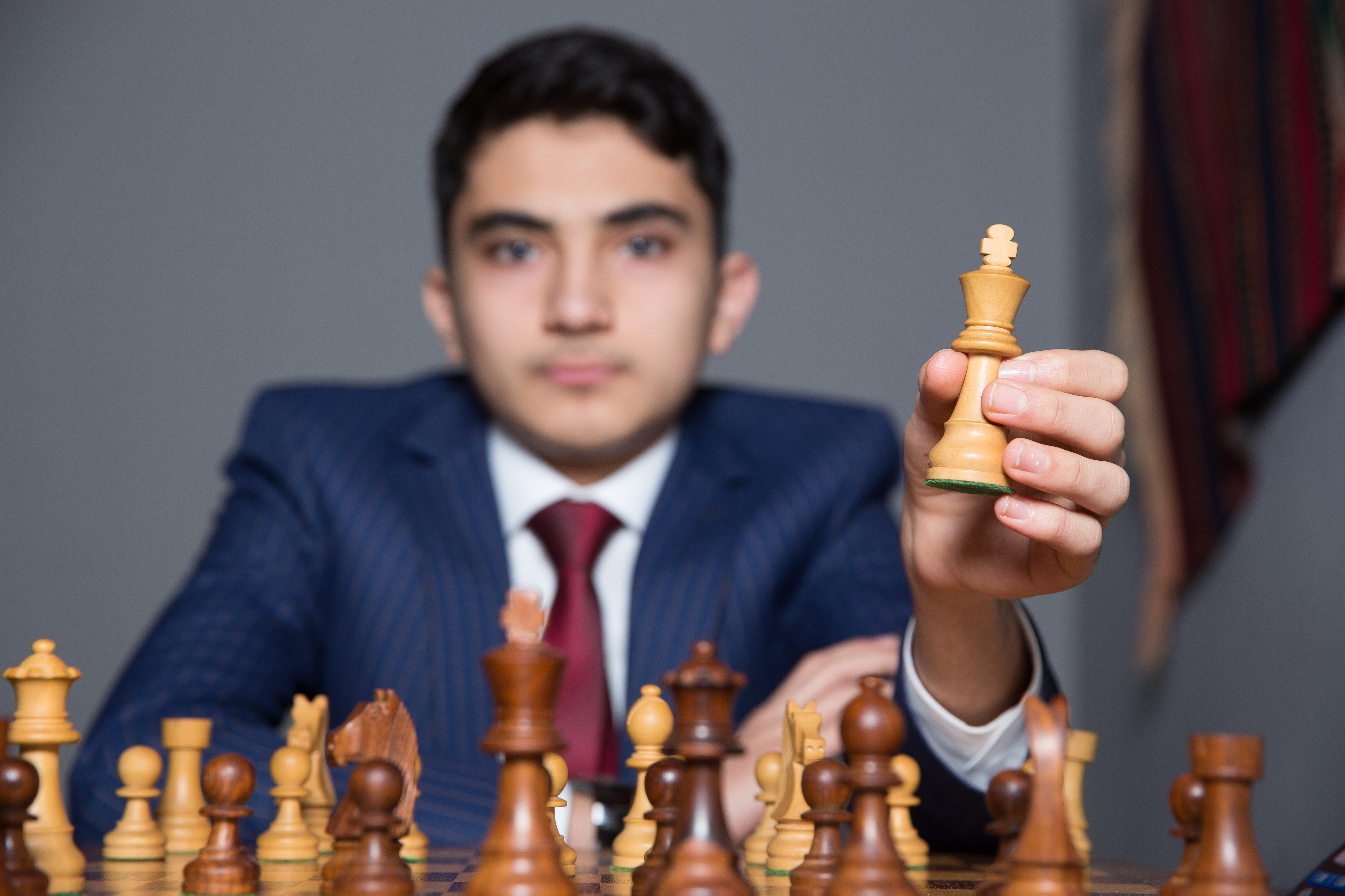 Abdulla Qədimbəyli